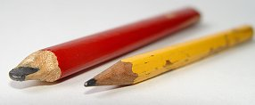 Eigen foto